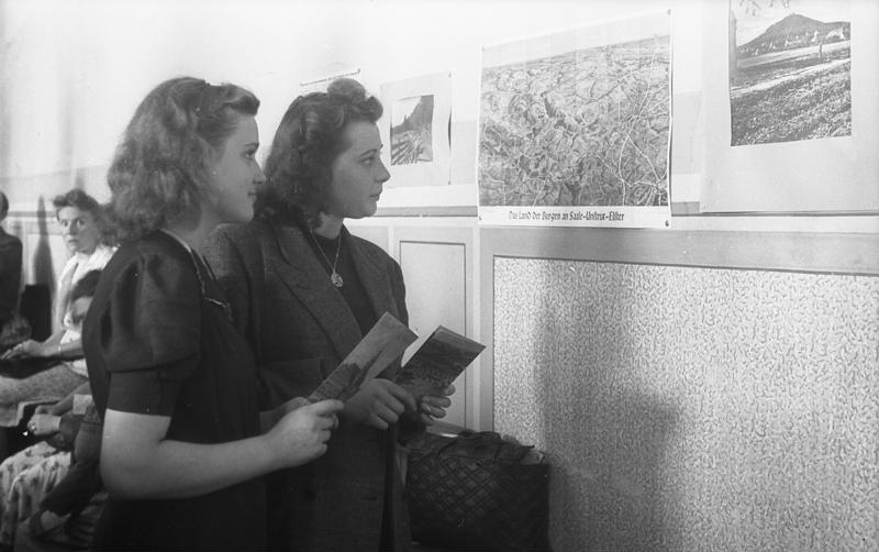 ADN-ZB Sowjetische Besatzungszone Deutschlands Beim Feriendienst des FDGB: Bevor man auf Reisen geht, sieht man sich auf der Karte seinen Urlaubsort an. Aufn.: 6.7.1949/ Igel 3547-49